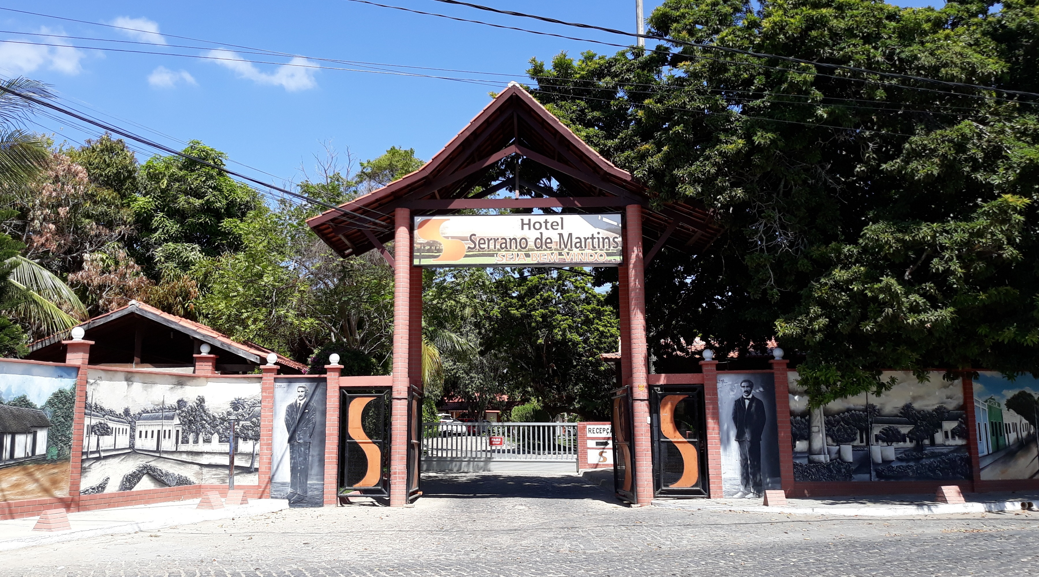 Hotel Serrano de Martins, Rio Grande do Norte (Brasil)